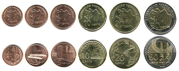 Azerbaijani qapiks